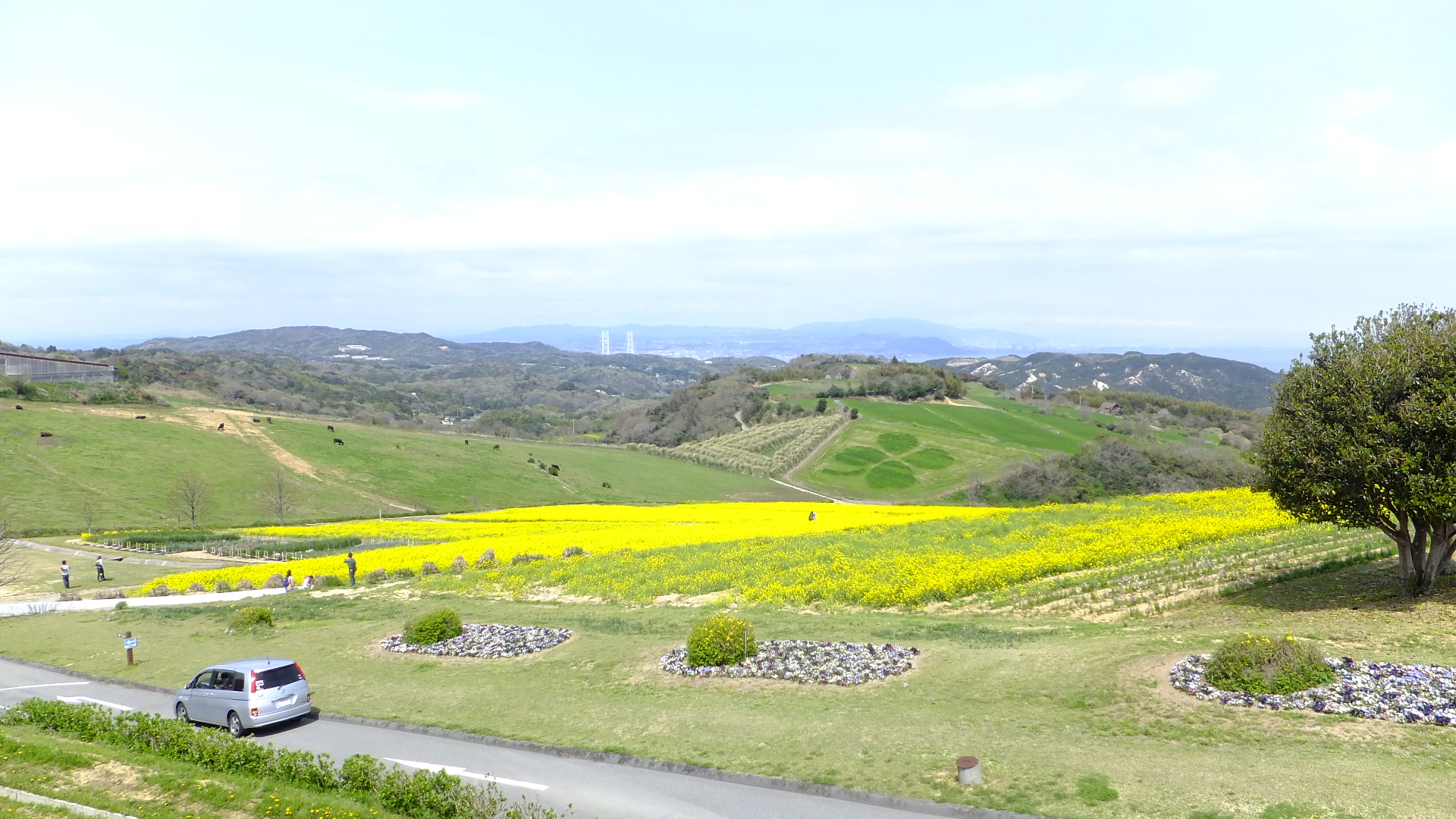 淡路花さじき